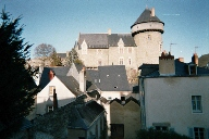 Château Fort De Laval - France - Décembre 2004 - small .